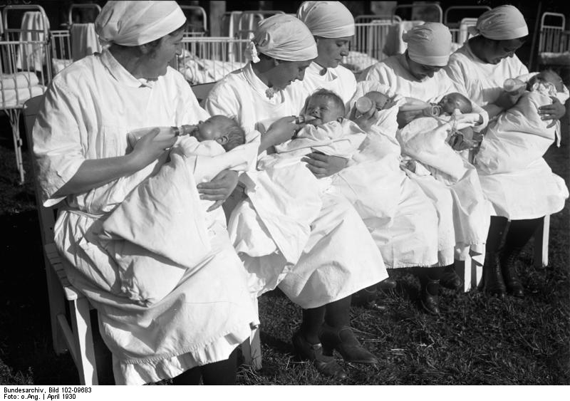 Ein Kinder-Paradies in der Grosstadt Berlin! In dem Berliner städtischen Krankenhaus für Säuglingspflege werden die neugeborenen Grosstadtkinder unter der liebevollen Pflege von Schwestern über die ersten Wochen und Monate hinweggebracht. Bei schönem Wetter werden die kleinen Erdenbürger nach ärztlicher Anordnung im Garten des Heims den wärmenden Strahlen der Frühlingssonne ausgesetzt. Einnehmen der Mittagsmahlzeit unter liebevoller Betreuung der Schwestern.